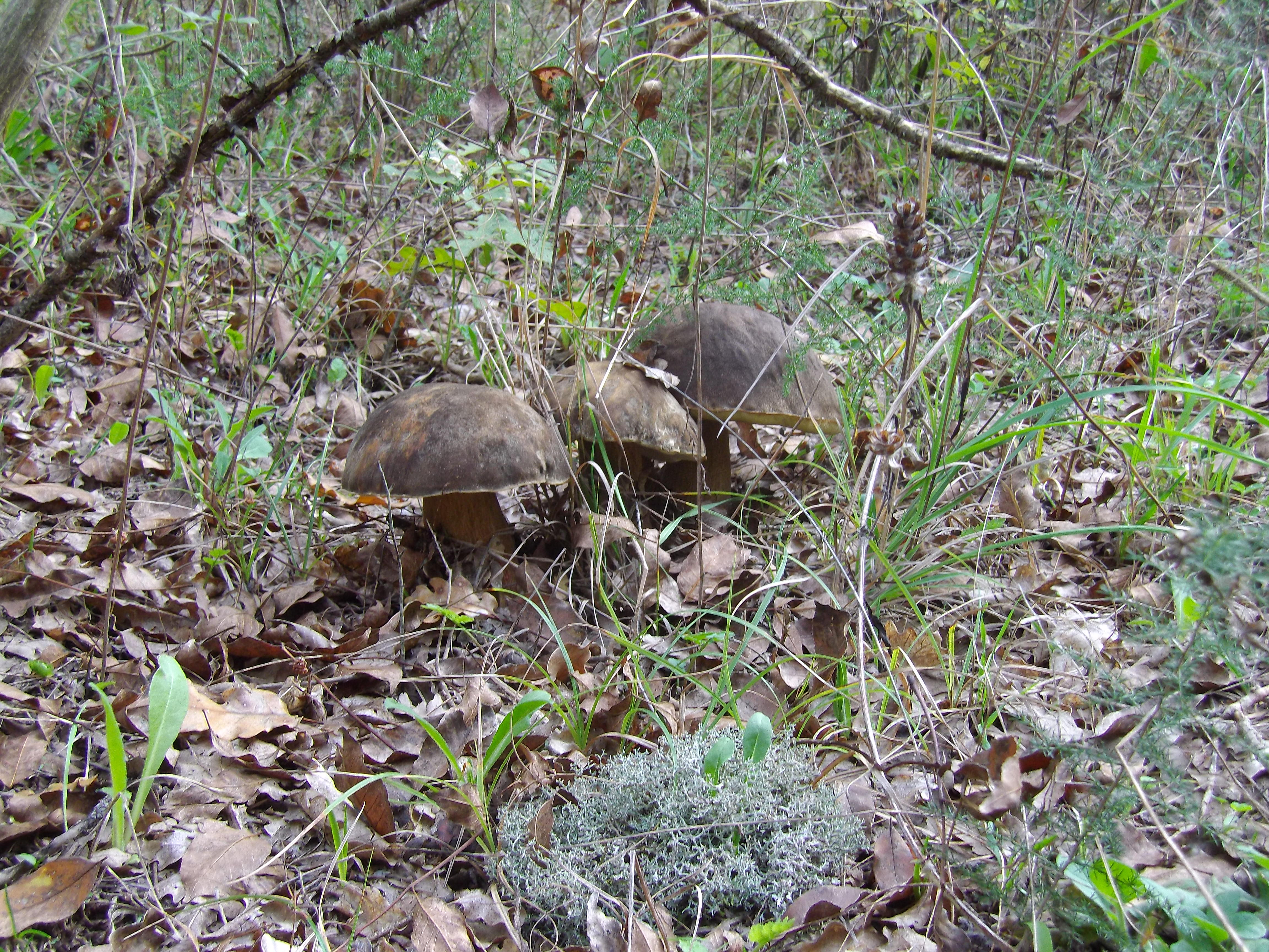 Boletus aereus -italy-lazio(vt)-porcino nero,bronzino,porcino reale.